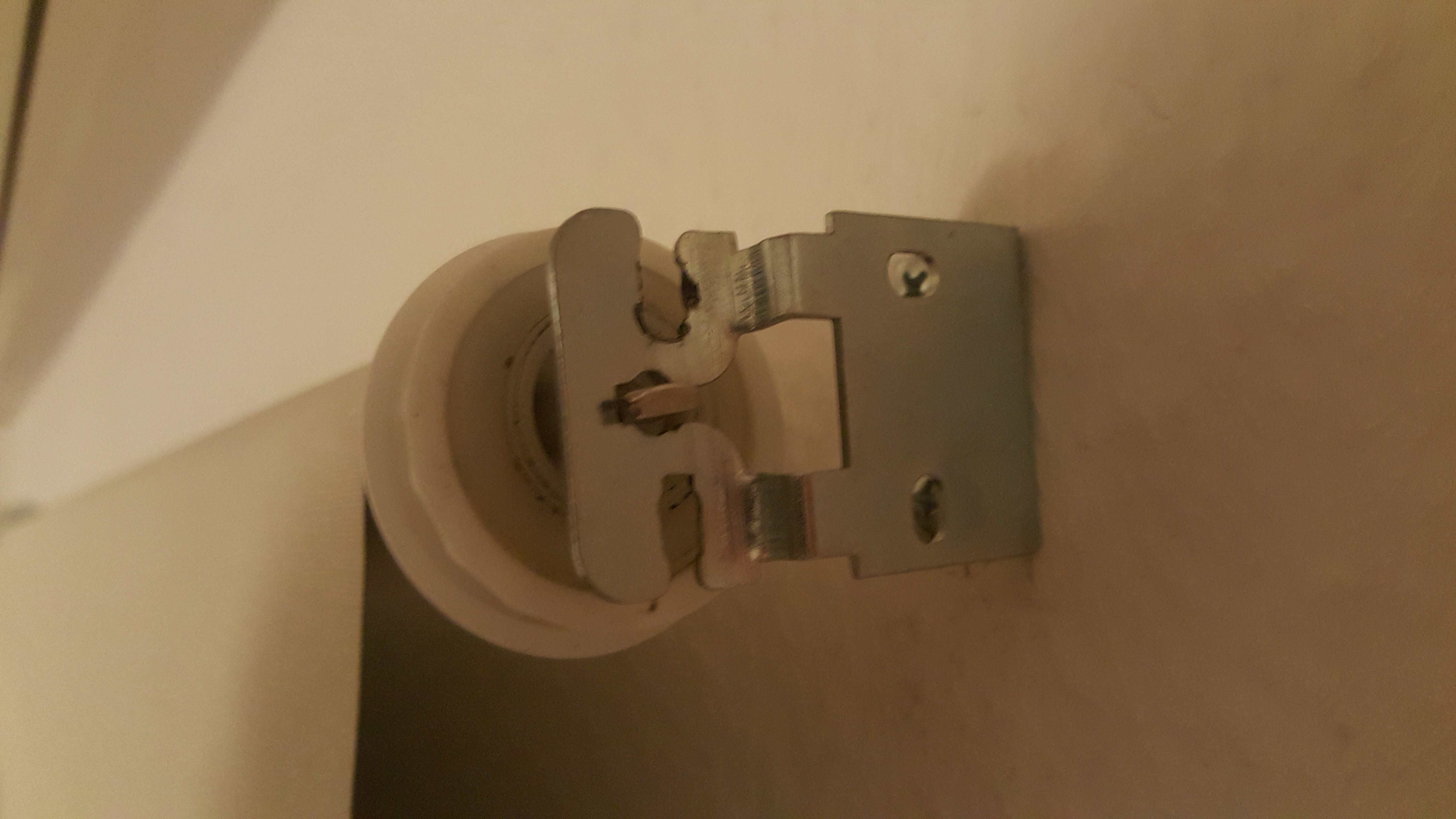 Aufhängung eines Rollos mit Seilzug